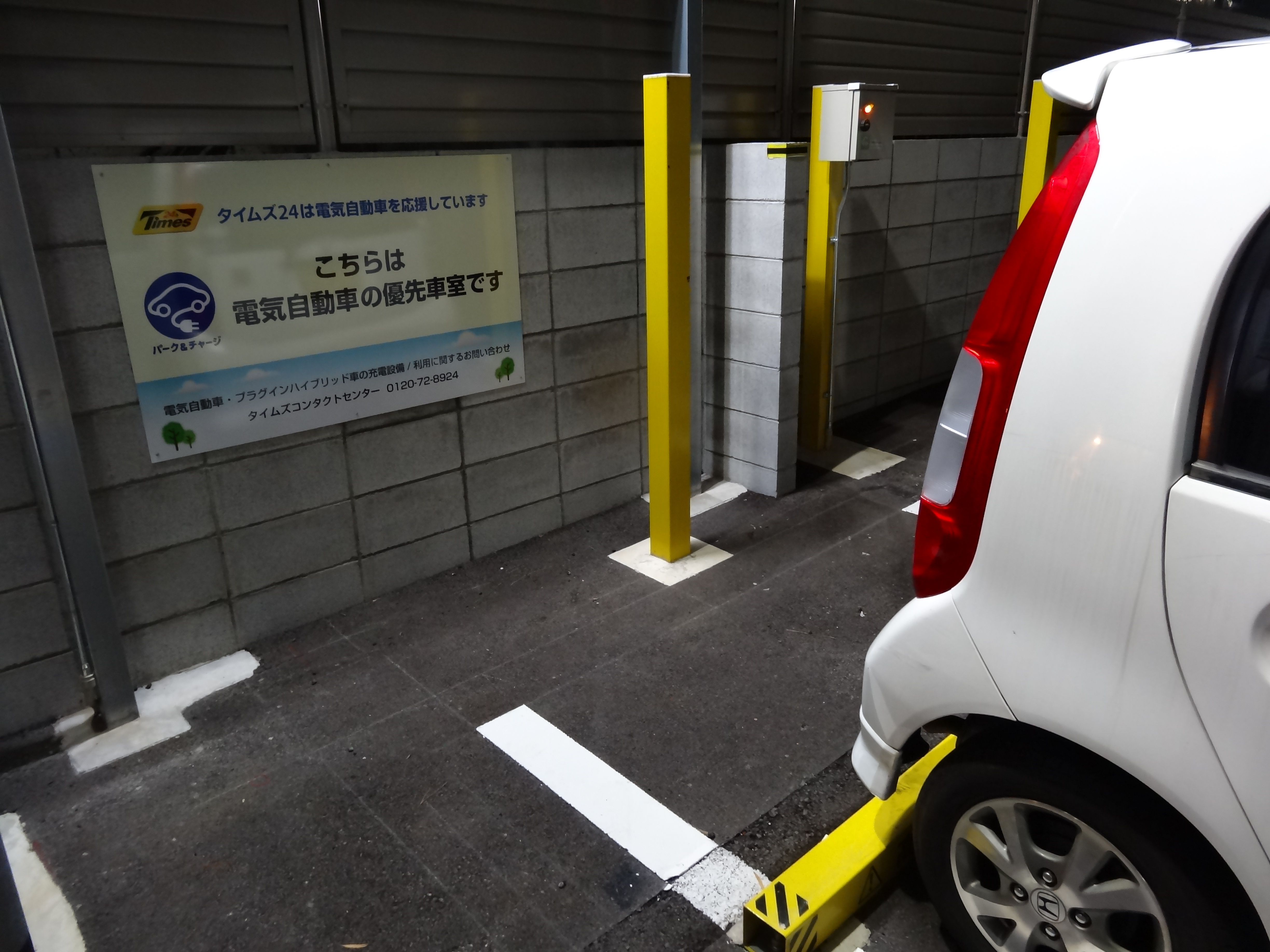 EV・PHV優先区画で、他に空きがあっても、一般車に停められてしまうケースが非常に多い。